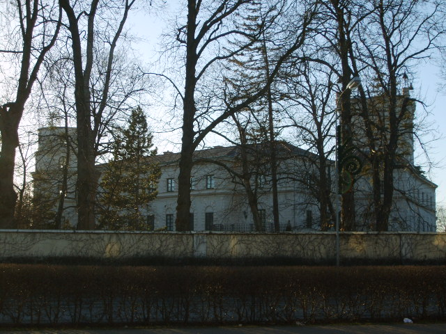 Schloss Oberwaltersdorf